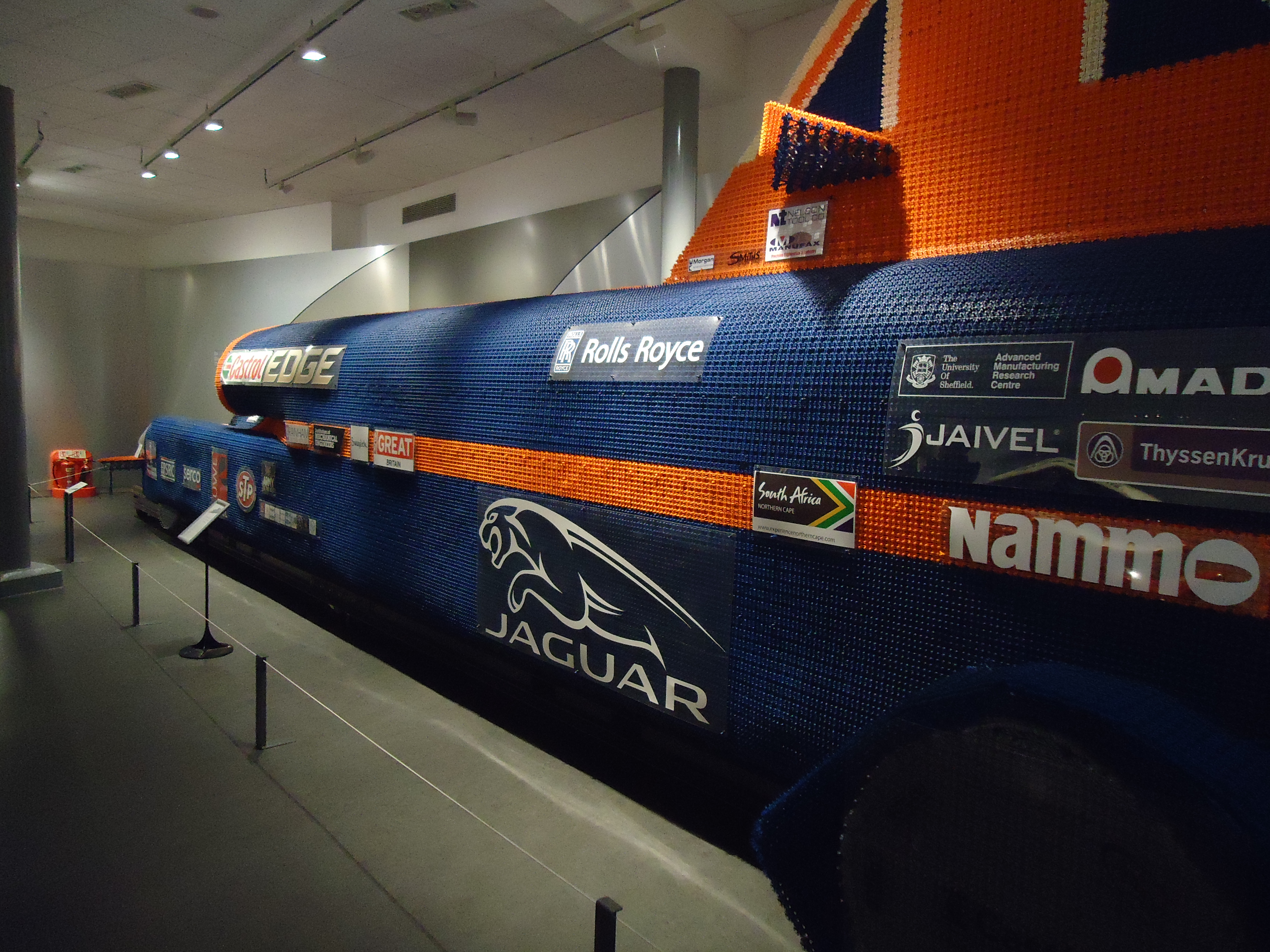 Museo del Transporte de Coventry